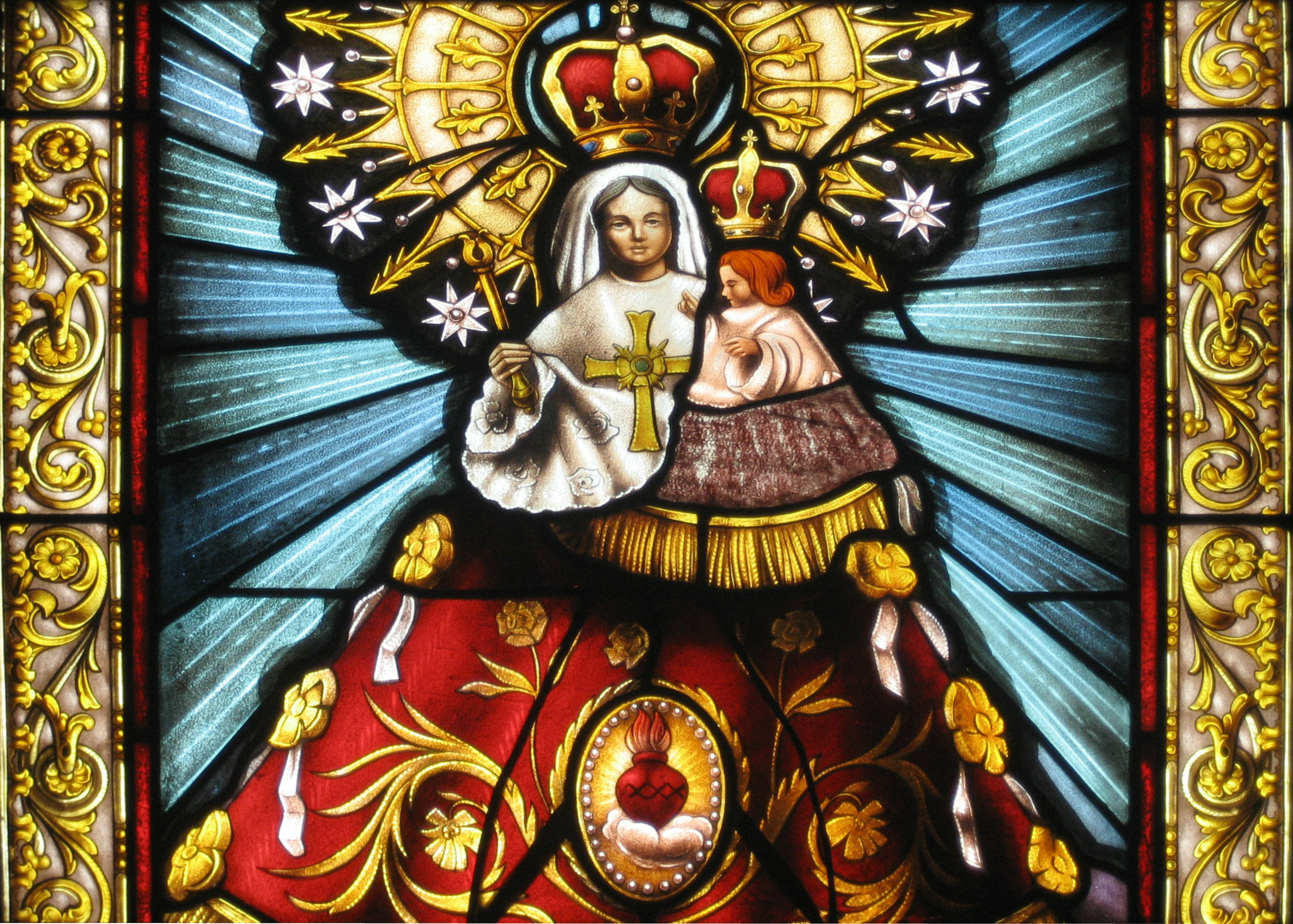 Cuba: Parroquia de San José de Jatibonico: Vitral de la Virgen de Vallivana - (detalle de su imagen).